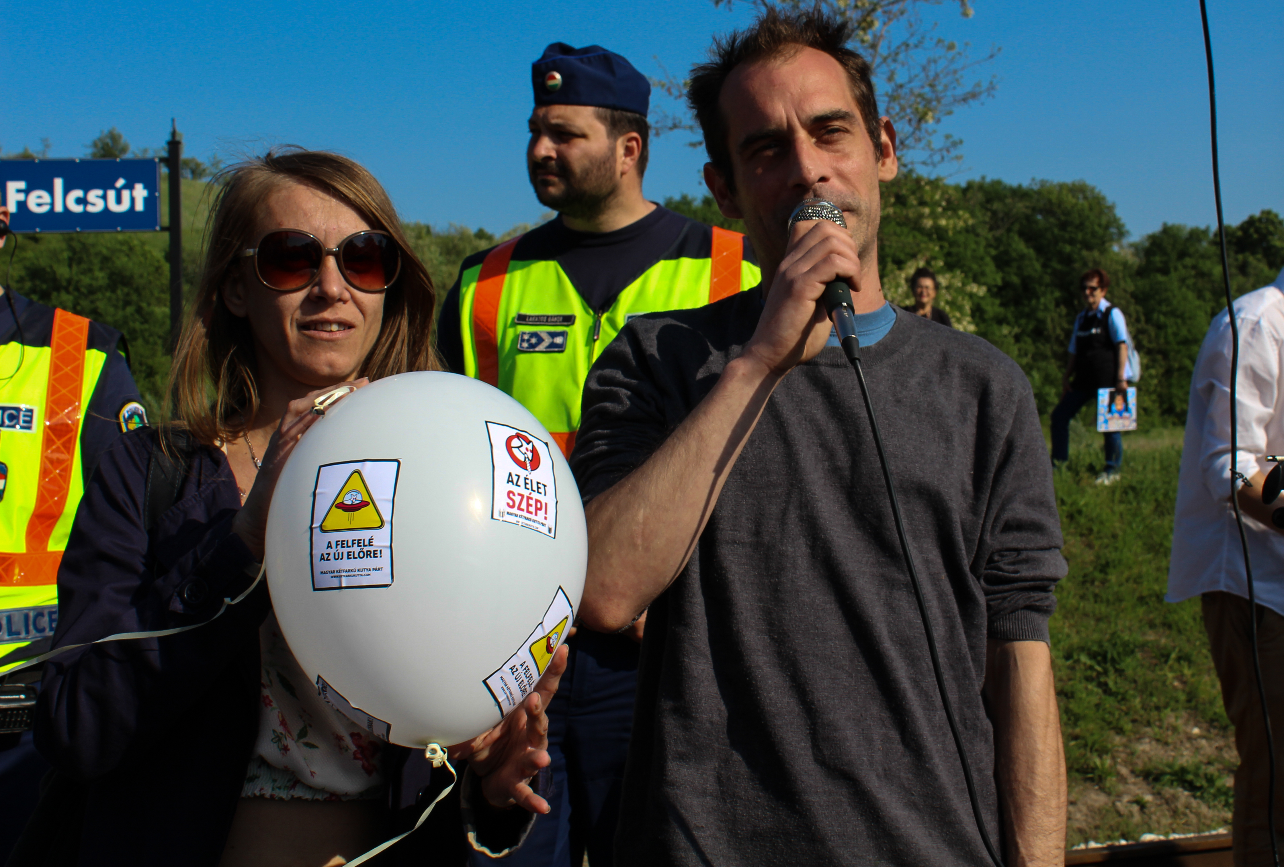 Kovács Gergely 2017-ben Felcsúton egy korrupcióellenes tüntetésen.